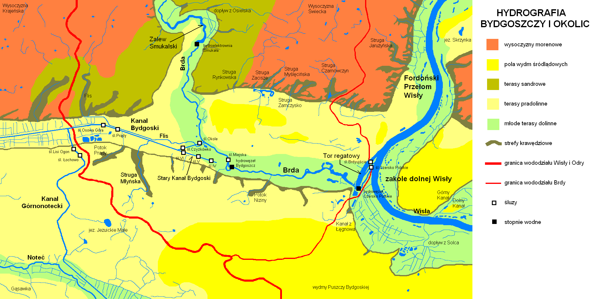 Hydrografia Bydgoszczy i okolic na podstawie "Środowisko przyrodnicze Bydgoszczy, red. J. Banaszak, 1996 oraz map hydrograficznego podziału Polski, red. H. Czarnecka, Warszawa 1980"